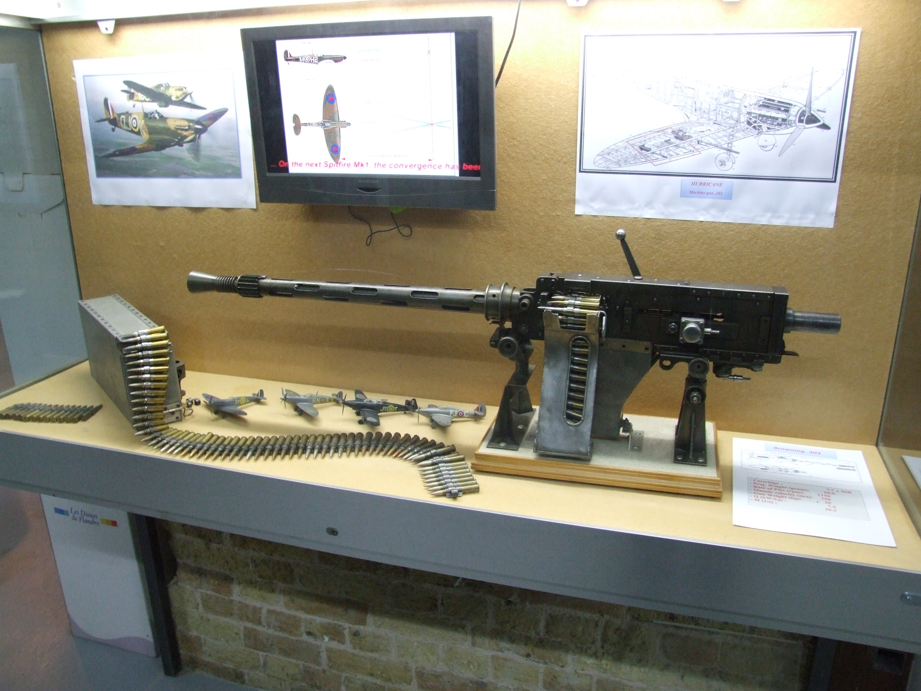 M2 Browning - Colt-Browning M2 cal 50 (12,7 mm) - Mémorial du Souvenir, Dünkirchen